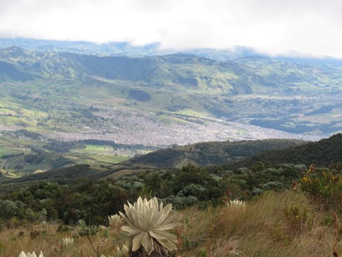 Puntos mas altos de la montaña.